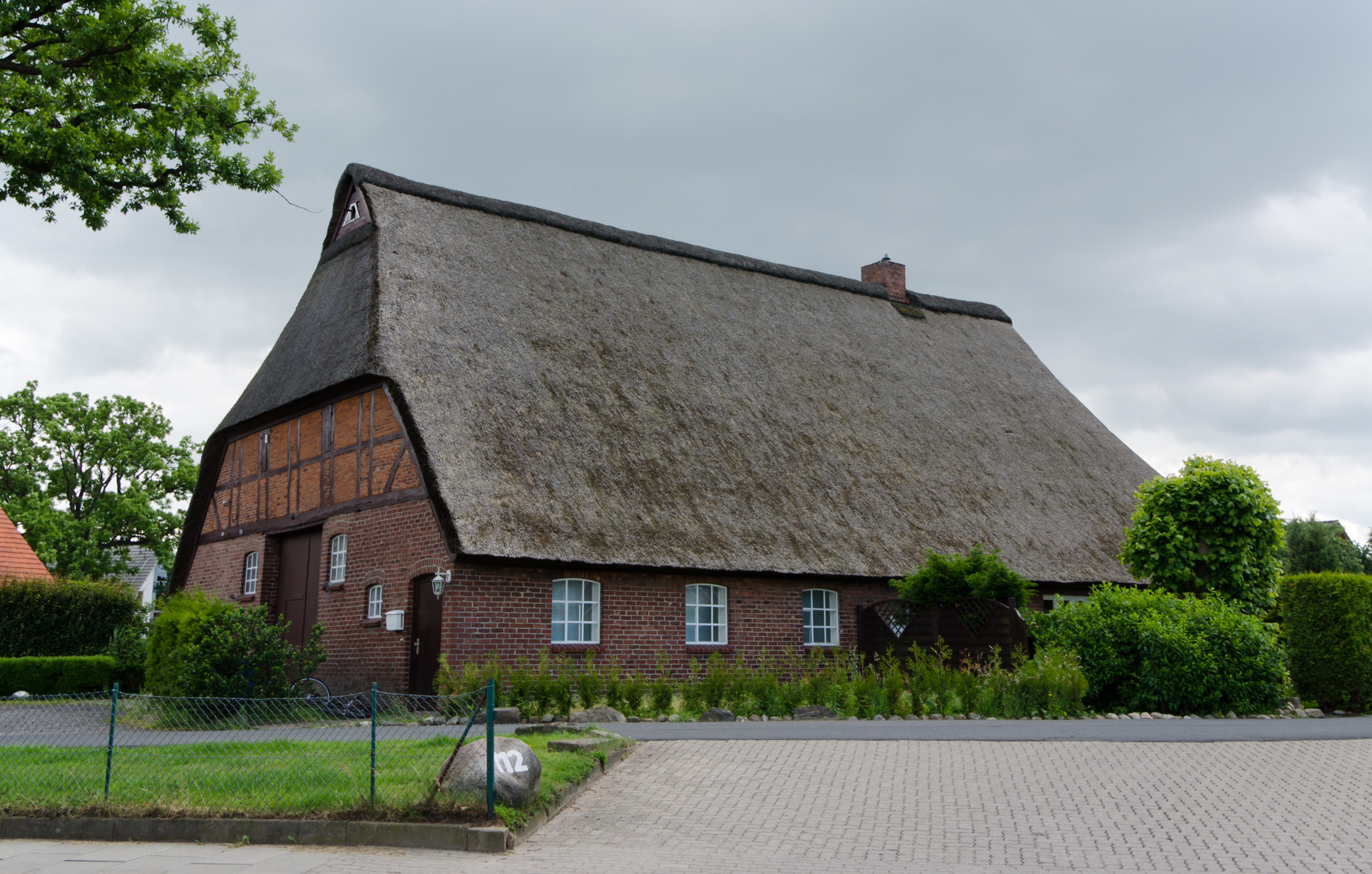 Tangstedt, Dorfstraße 112